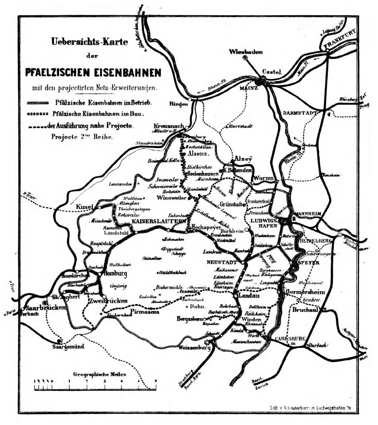 Pfälzische Eisenbahnen zum Stand 01.01.1870